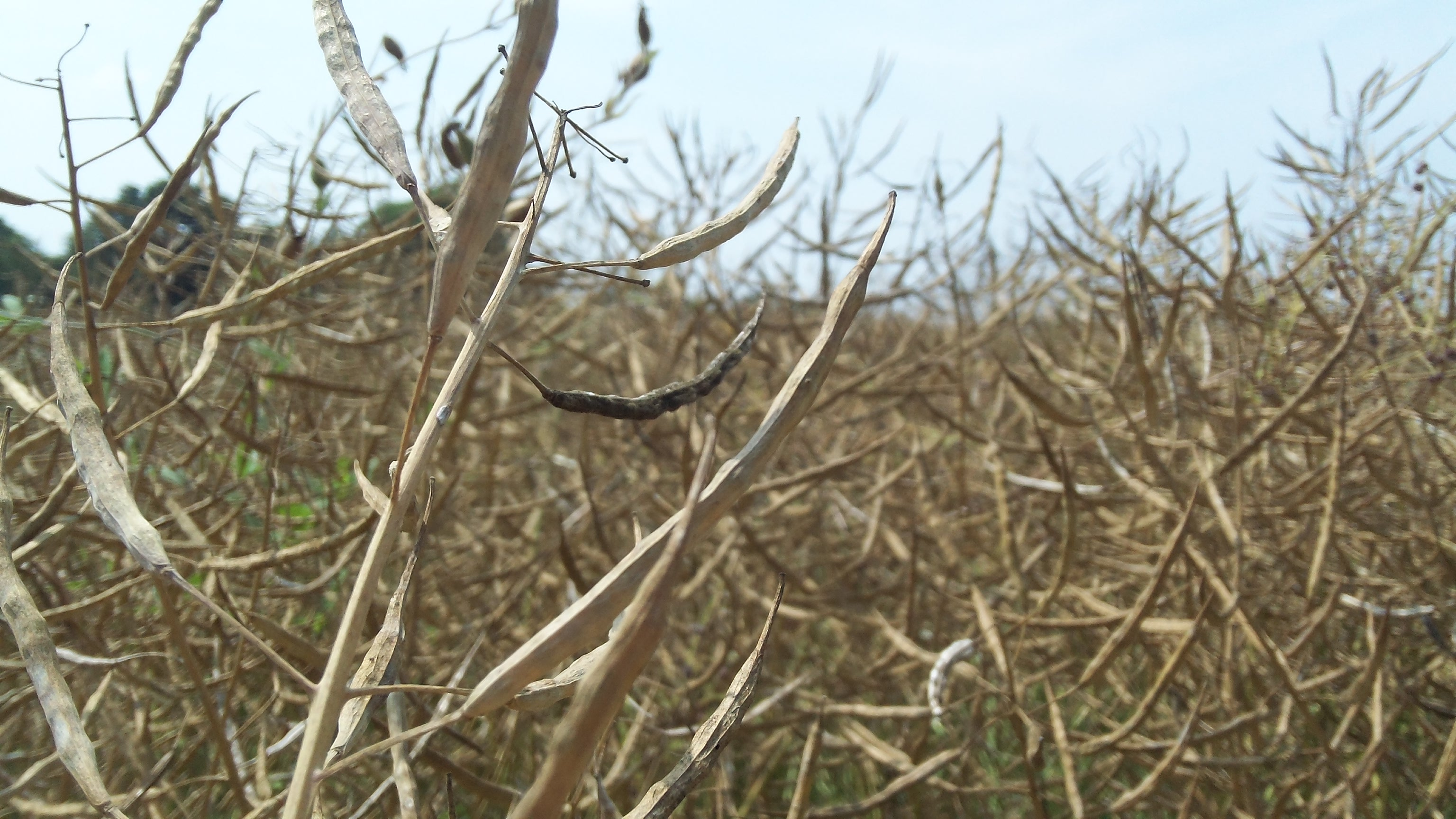 Plante de colza ayant atteint maturité et prête à être moissonnée.